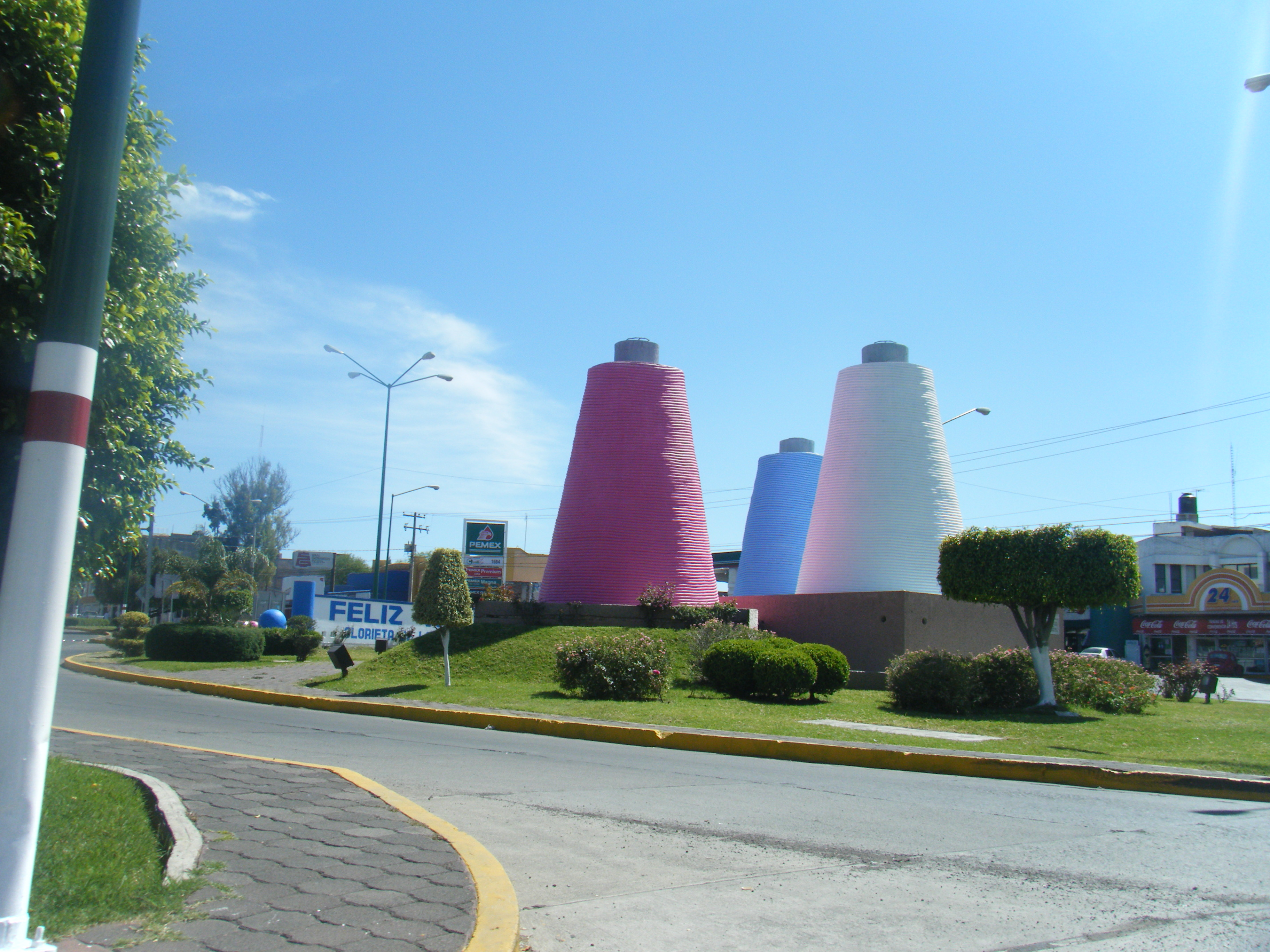 Glorieta de la Amistad Moroleón, vista desde Uriangato